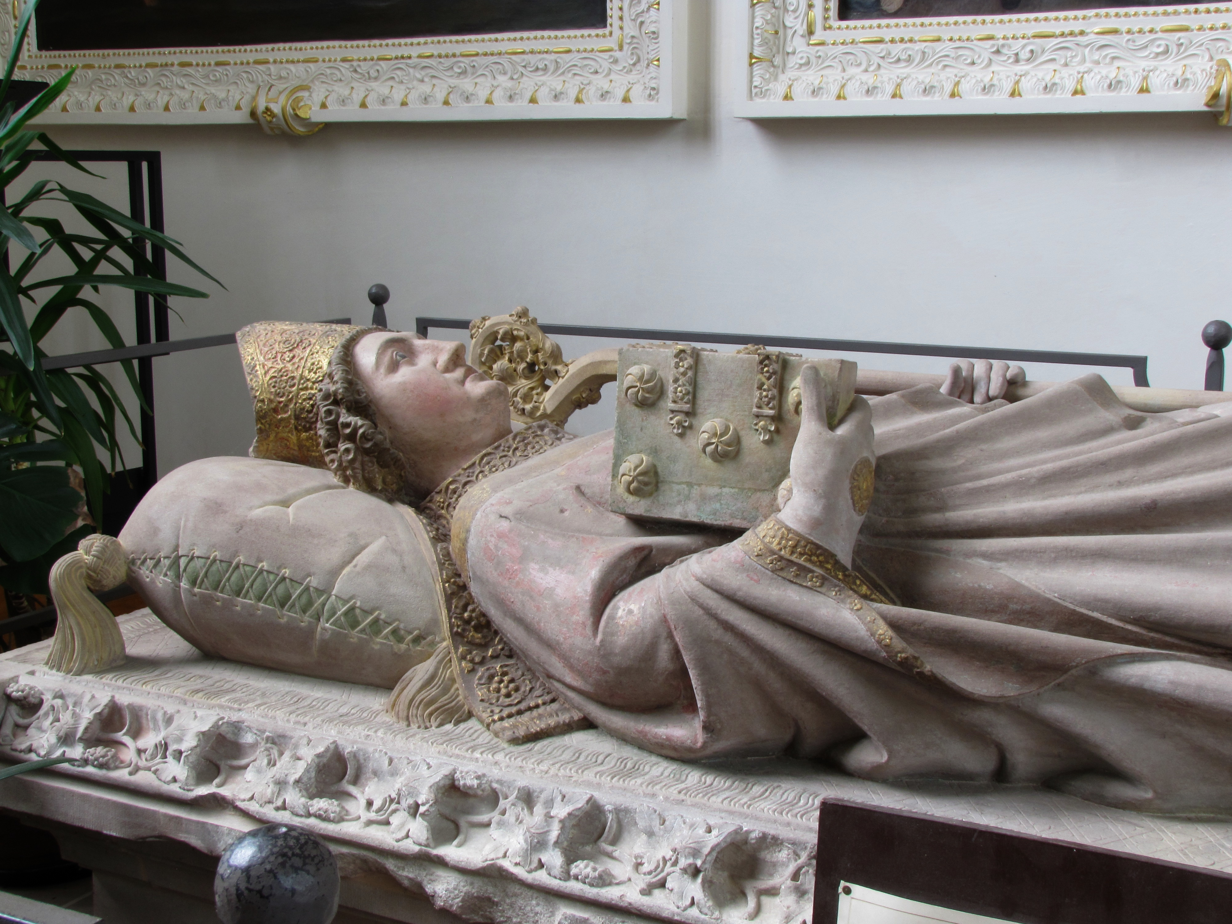 Alsace, Bas-Rhin, Église Saint-Georges de Molsheim, ancienne église des Jésuites (1618) (PA00084798, IA67006097). Tombeau de l'évêque de Strasbourg Jean de Dirpheim (XIVe): This object is classé Monument Historique in the base Palissy, database of the French furniture patrimony of the French ministry of culture, under the references PM67000178 and IM67009657.